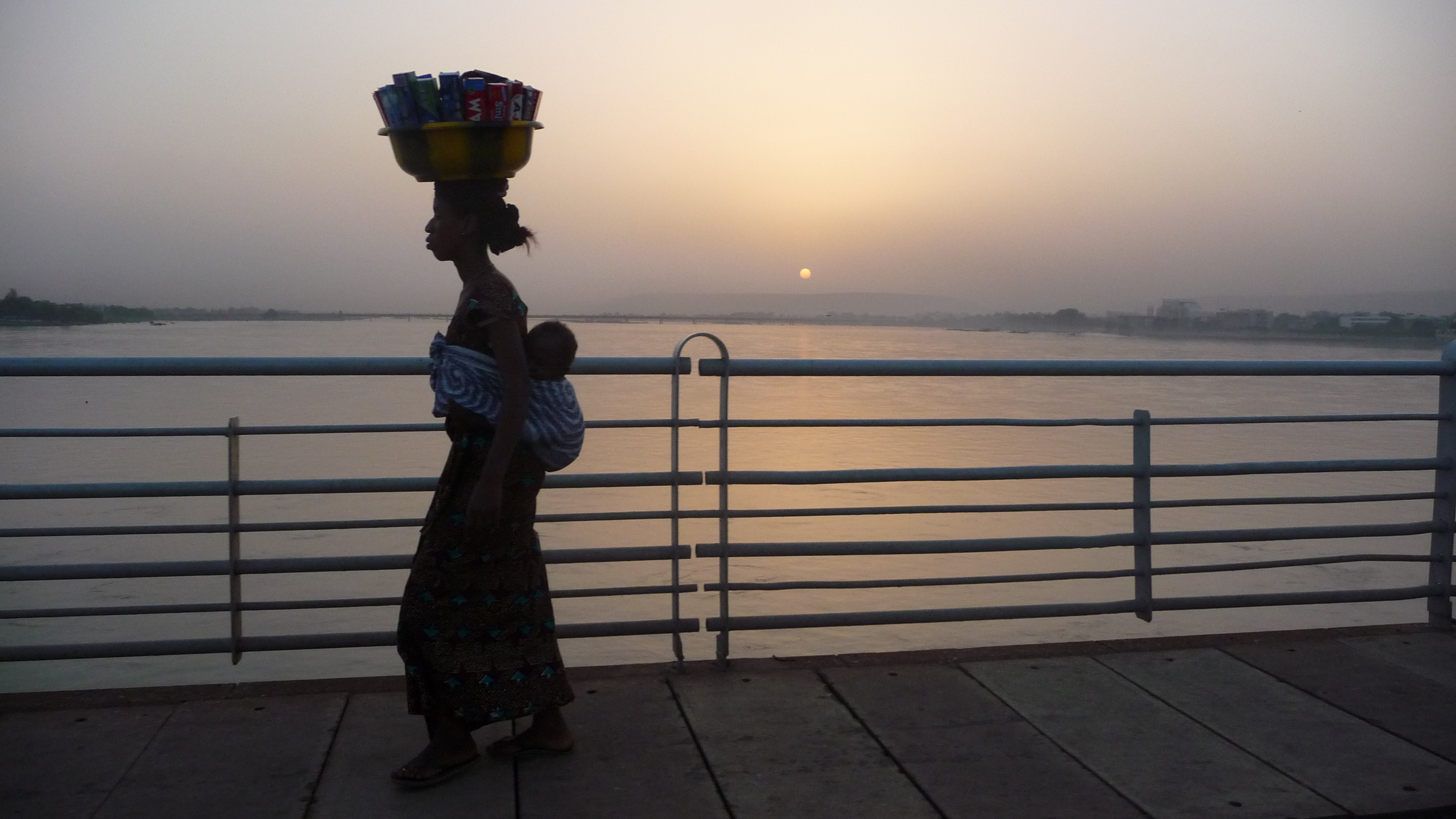 Les femmes sont les premières debout et dernières couchées en Afrique de l'Ouest. Elles sont perpétuellement en mouvement. This is an image with the theme "Africa on the Move or Transport" from: Mali